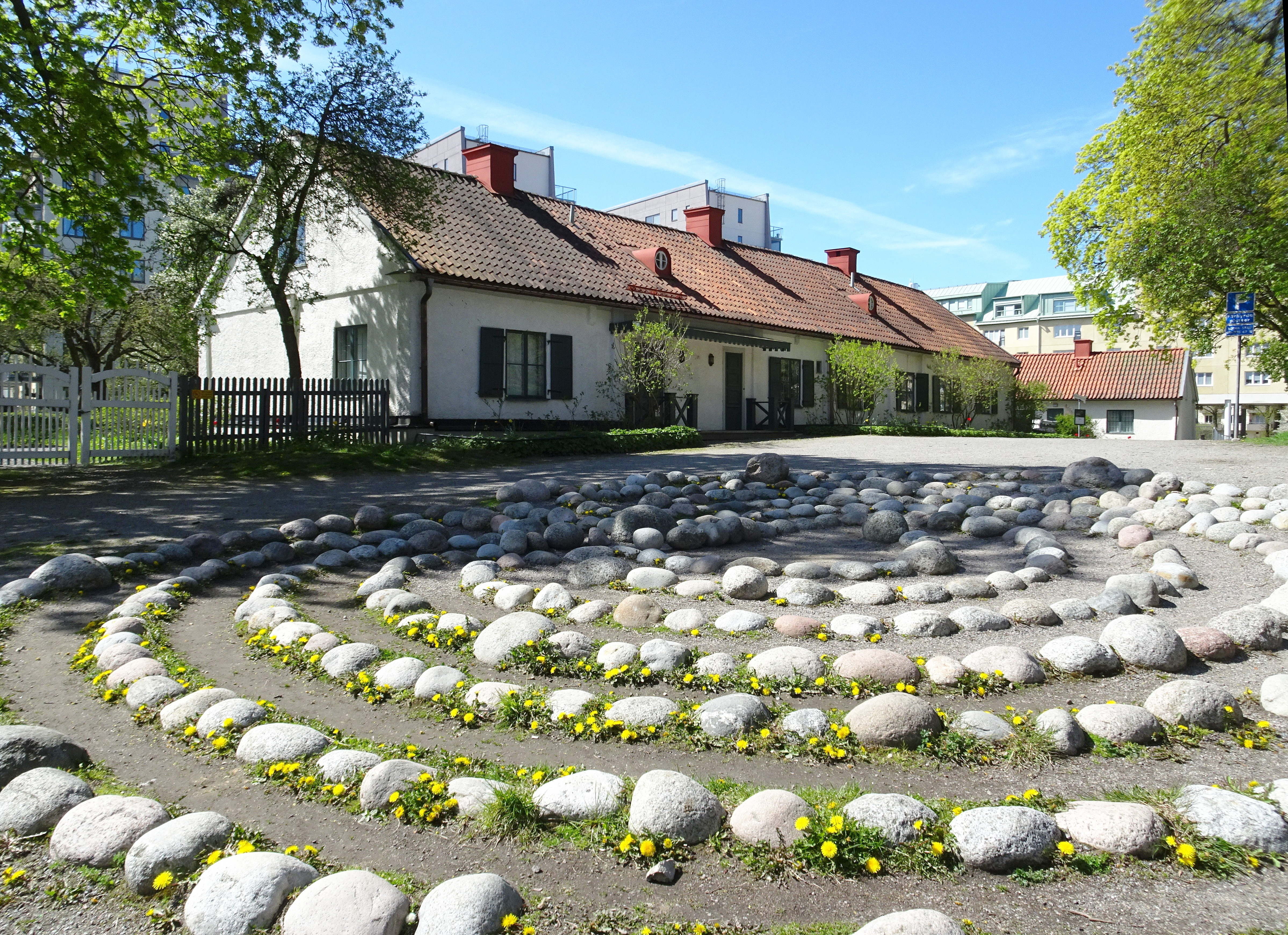 Charlottenburgs gård, med nyanlagt labyrint